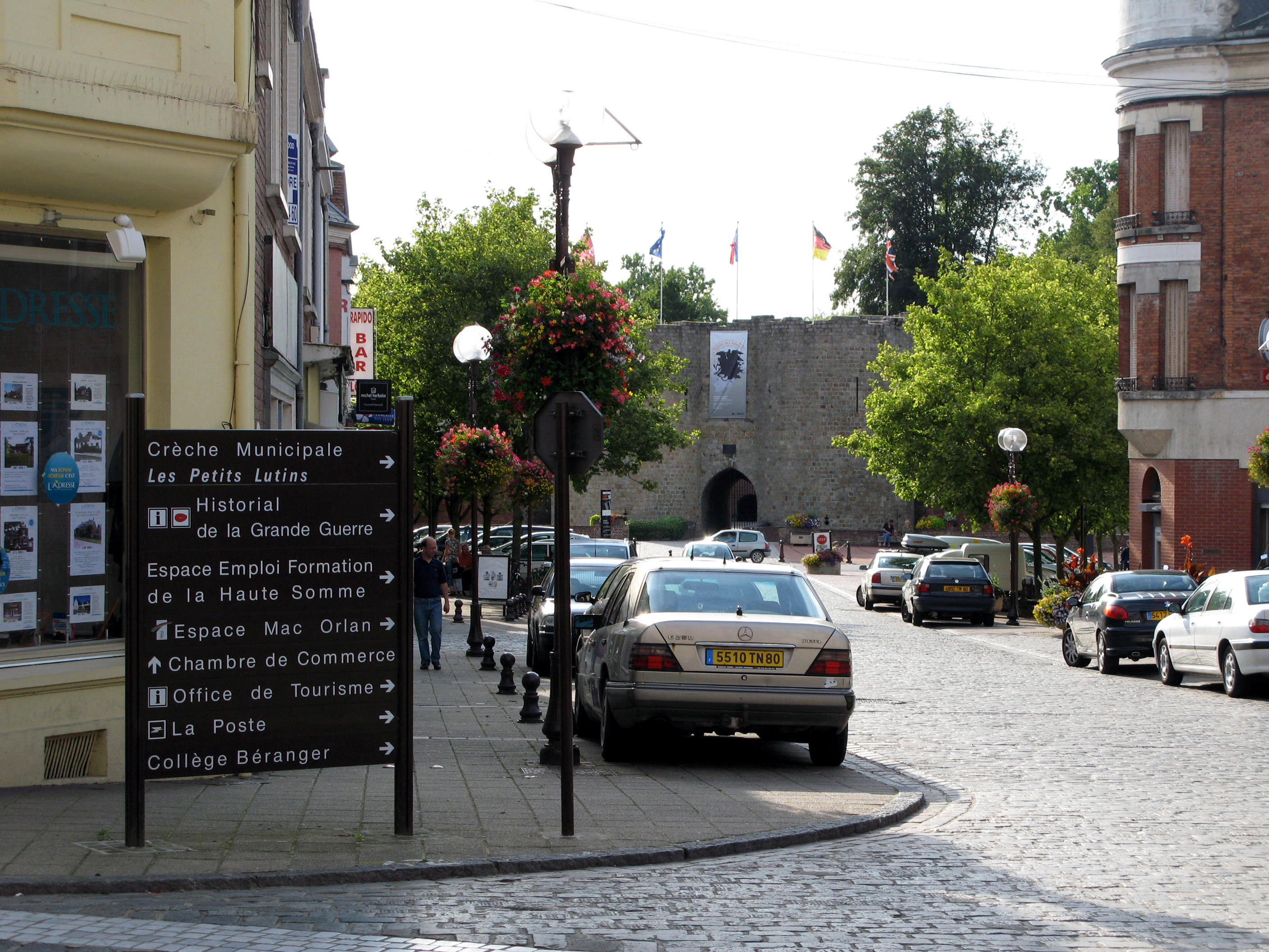 Péronne (Somme, France) - Centre ville avec l'Historial au bout de la rue Louis XI.